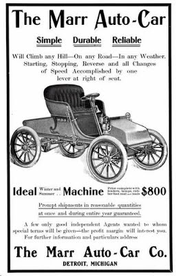 Anuncio del Marr Auto Car de 1904